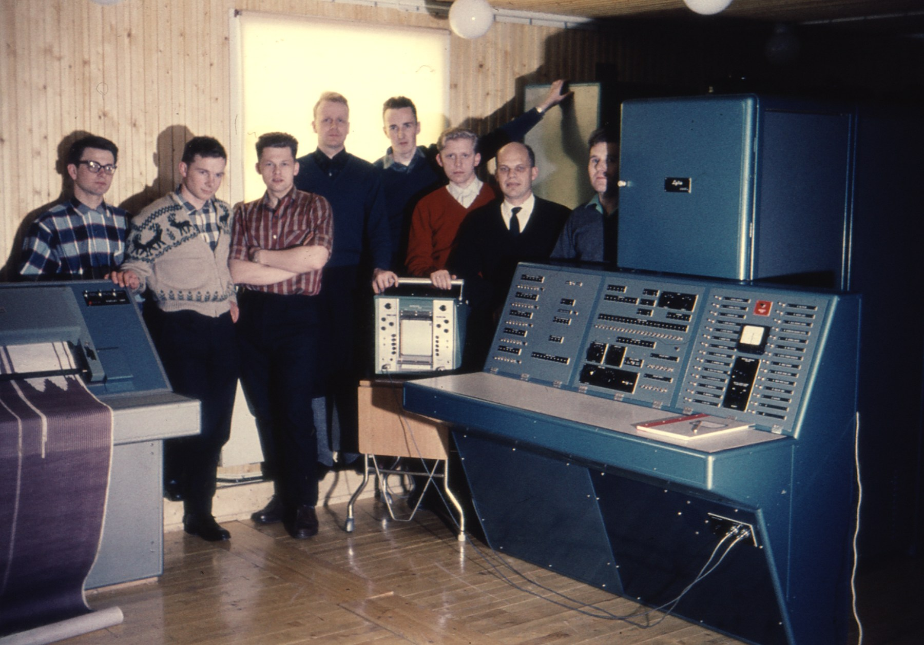 Siffergruppen, noen un ge forskere ved Forsvarets forskningsinstitutt, bidro til utvikling av norsk datateknikk.